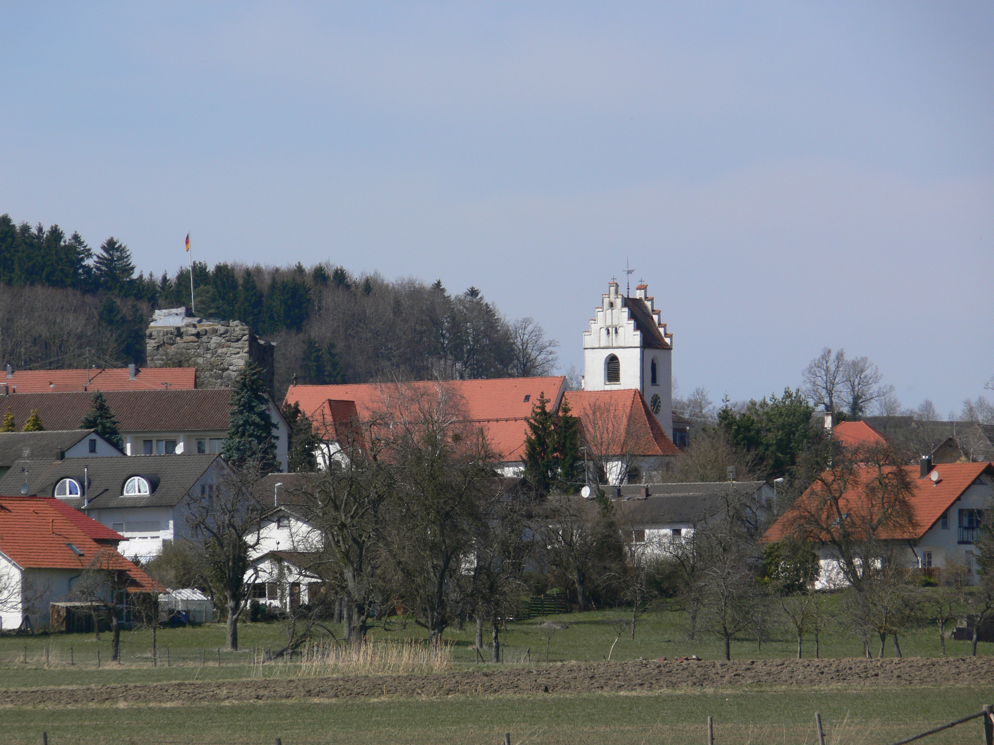 Gemeinde Fronreute, Landkreis Ravensburg Fronhofen, von Bettenreute aus gesehen